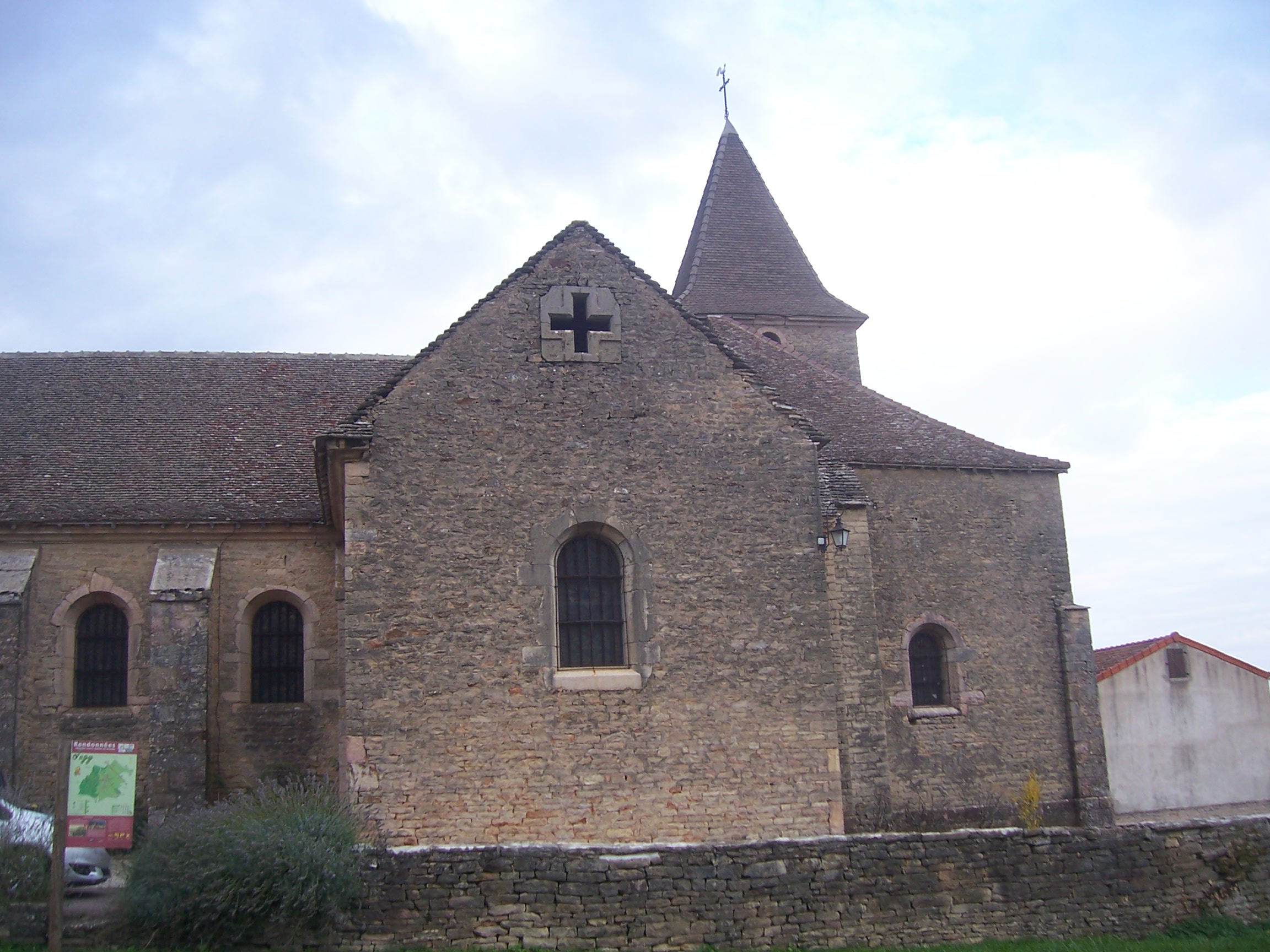 Eglise de Jugy